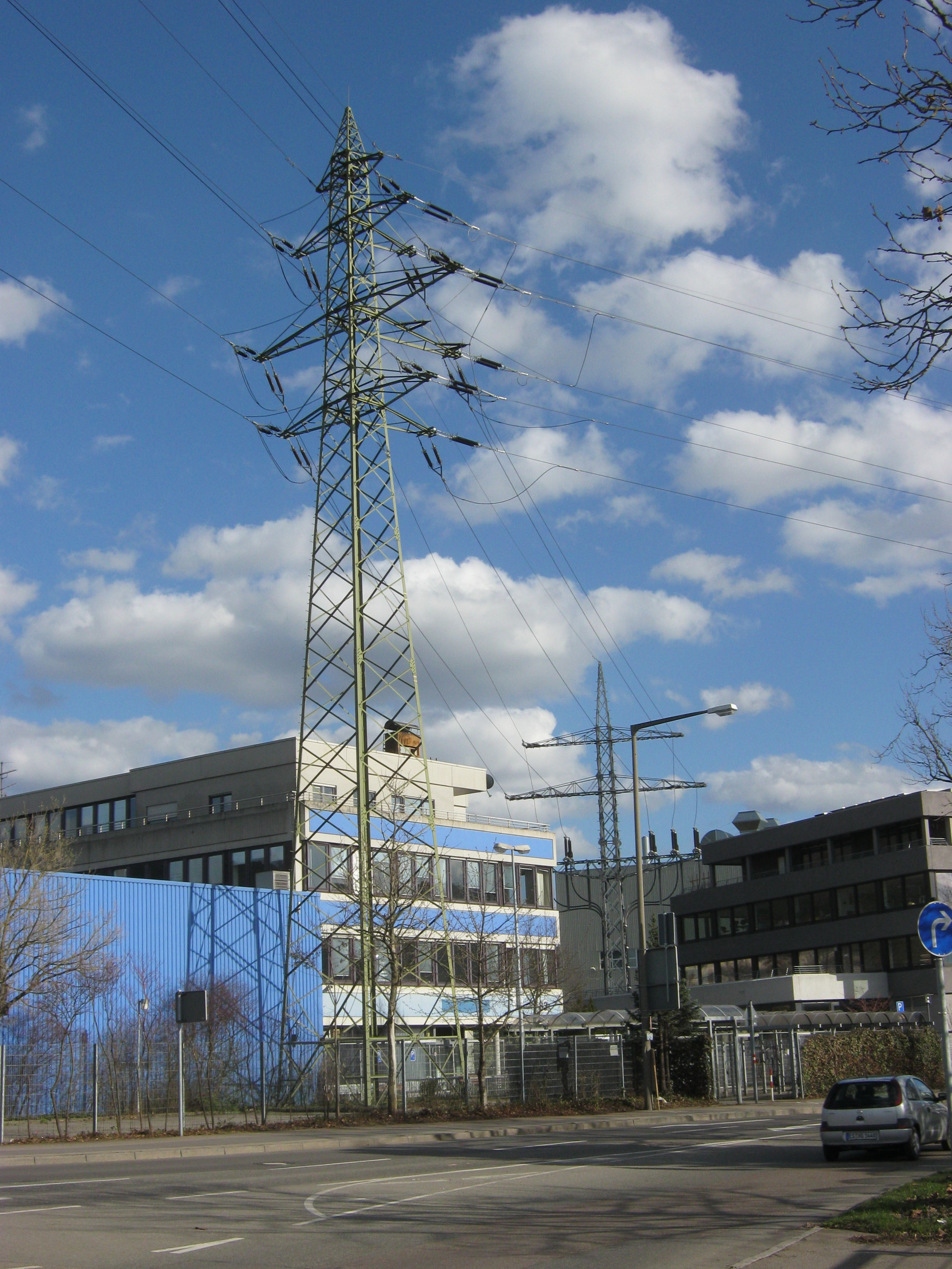 Abzweigmast einer 110-kV-Leitung am Umspannwerk in Stuttgart-Obertürkheim; Maststandort ehemals für die 110-kV-Leitung Obertürkheim–Niederstotzingen (Anlage 9461) genutzt